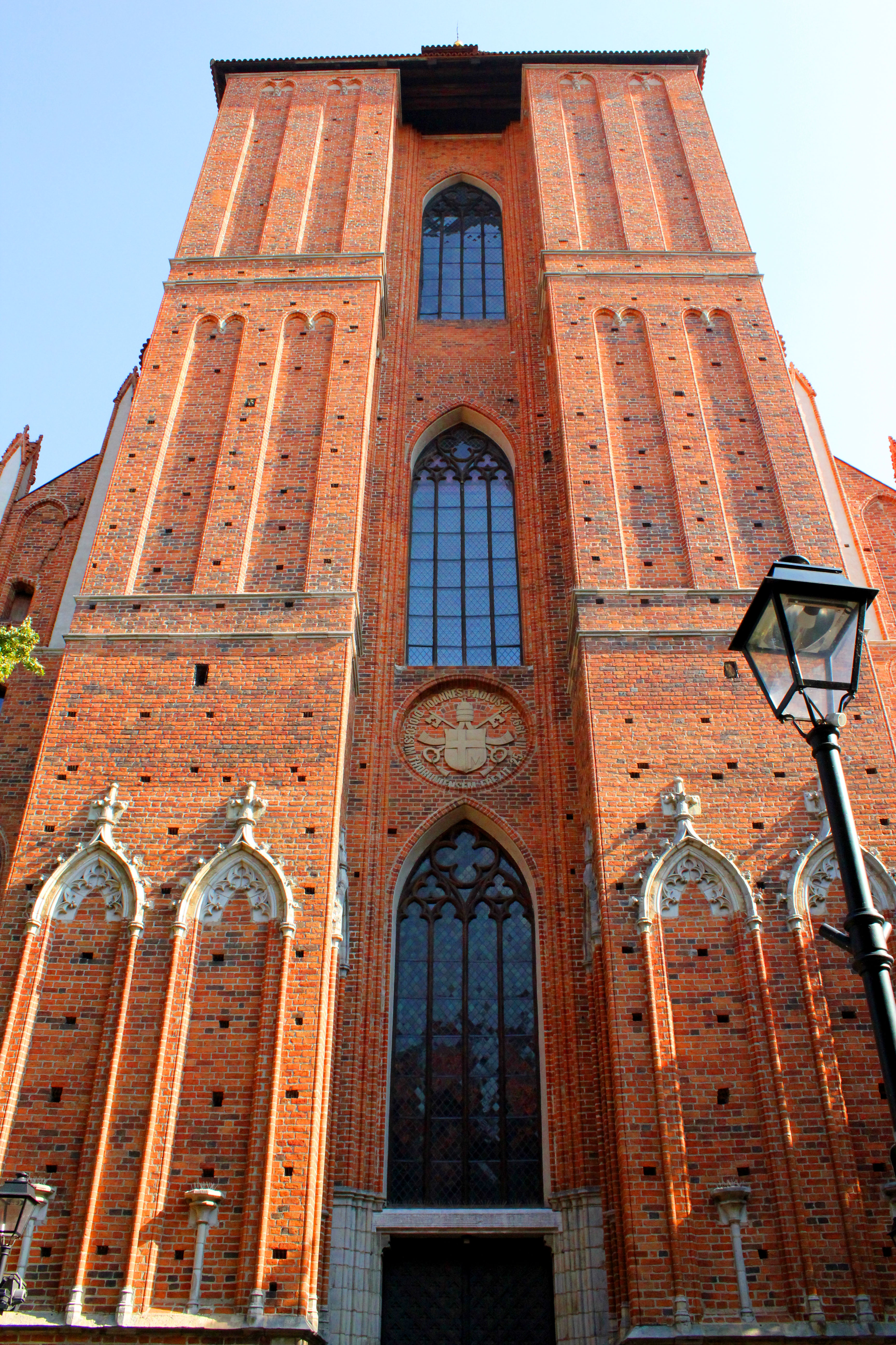 kościół par., ob. katedra p.w. śś. Jana Chrzciciela i Jana Ewangelisty Toruń, ul. Żeglarska